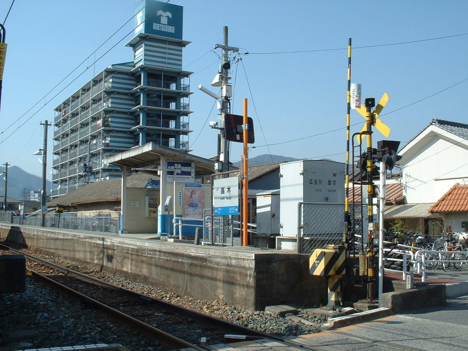 高木駅、2006年3月25日に投稿者が撮影